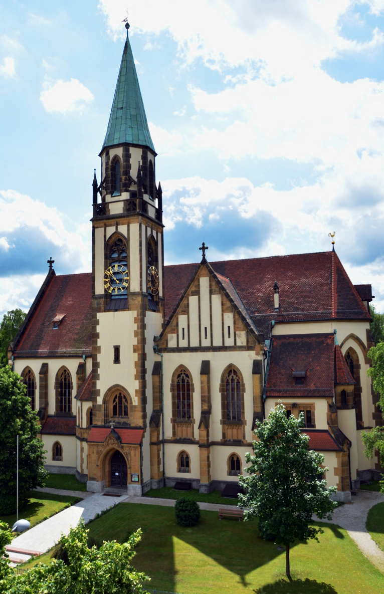 Fassade der 1914 eingeweihten evang.-luth. Pfarrkirche Heilig-Kreuz, Röthenbach an der Pegnitz. Nordwestansicht.